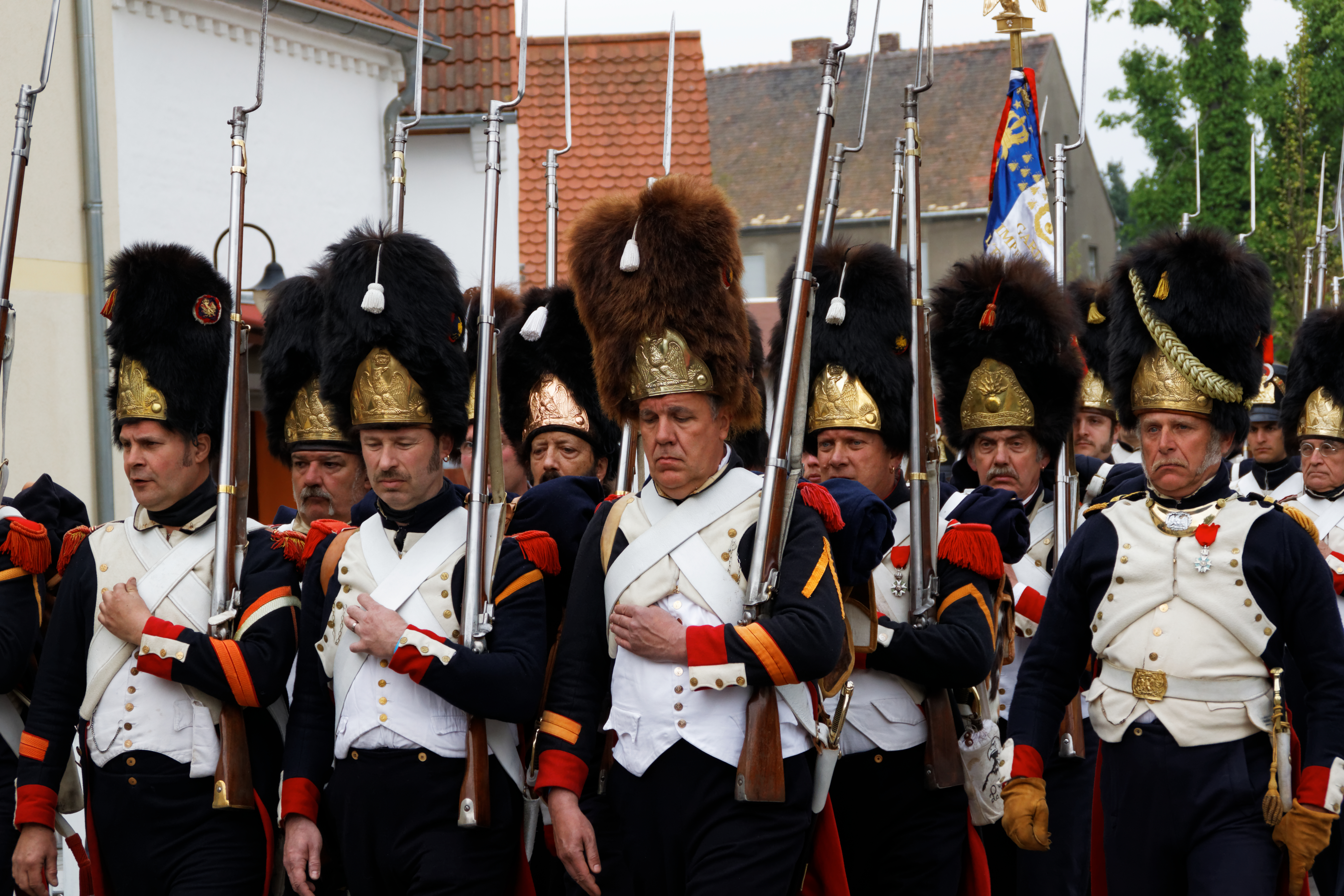 200-Jahr-Feier der Schlacht bei Großgörschen 1813